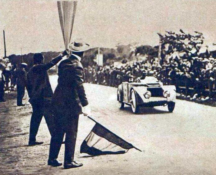 André Lagache, vainqueur de la Coupe Georges Boillot 1925.